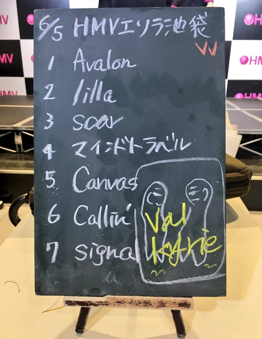 amiinAセトリボード(20170605(1))